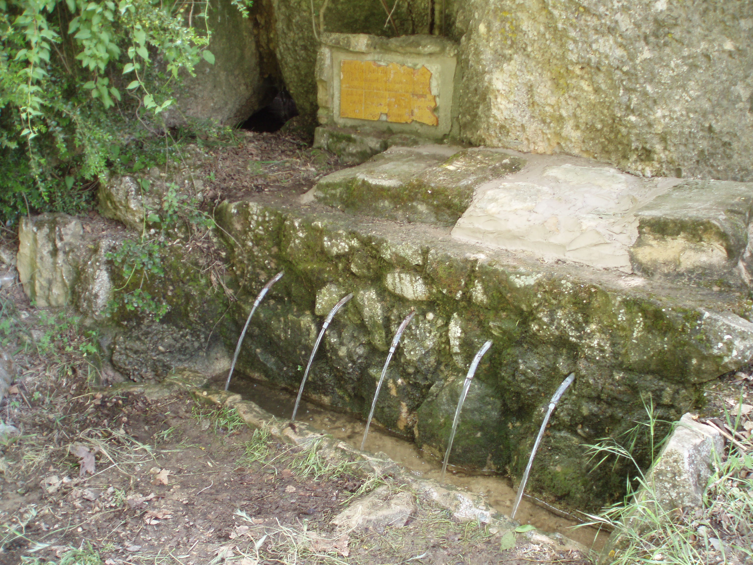 Fuente de "Les Besses" a 3 kilometros de Cervià de les Garrigues